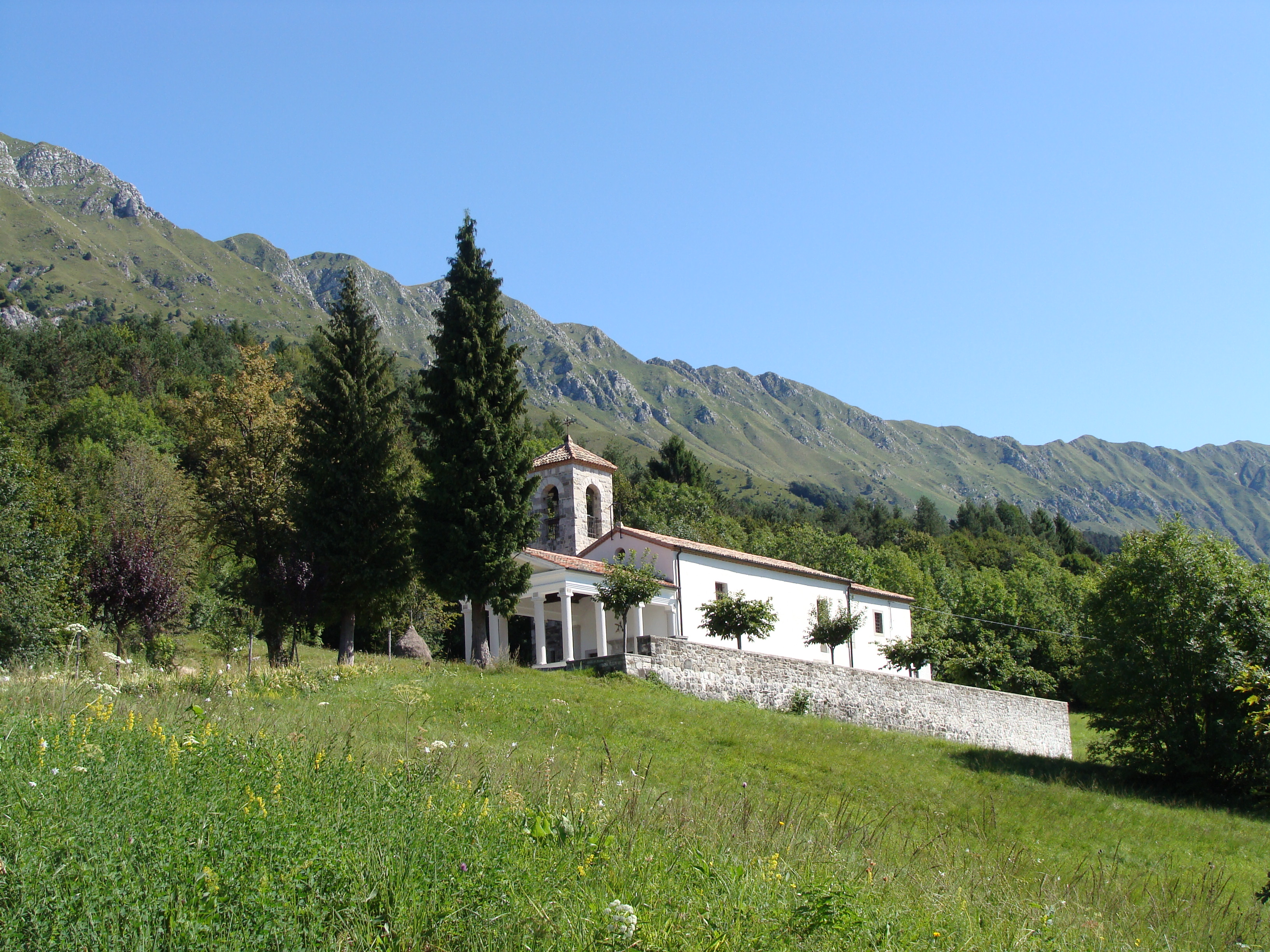 le Gran Monte vu de Monteaperta